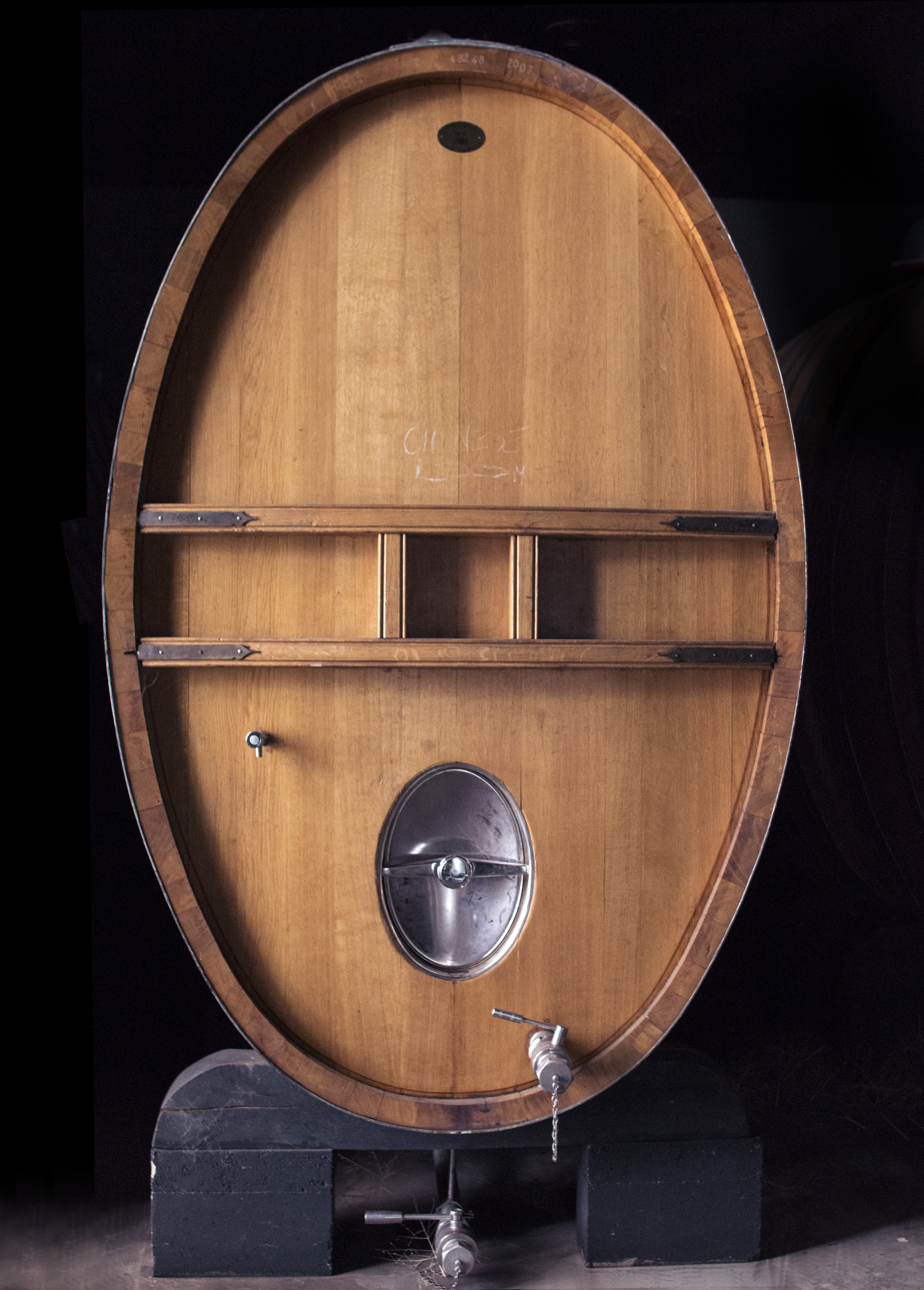 Foudre en bois pour la vinification et l'élevage du vin.